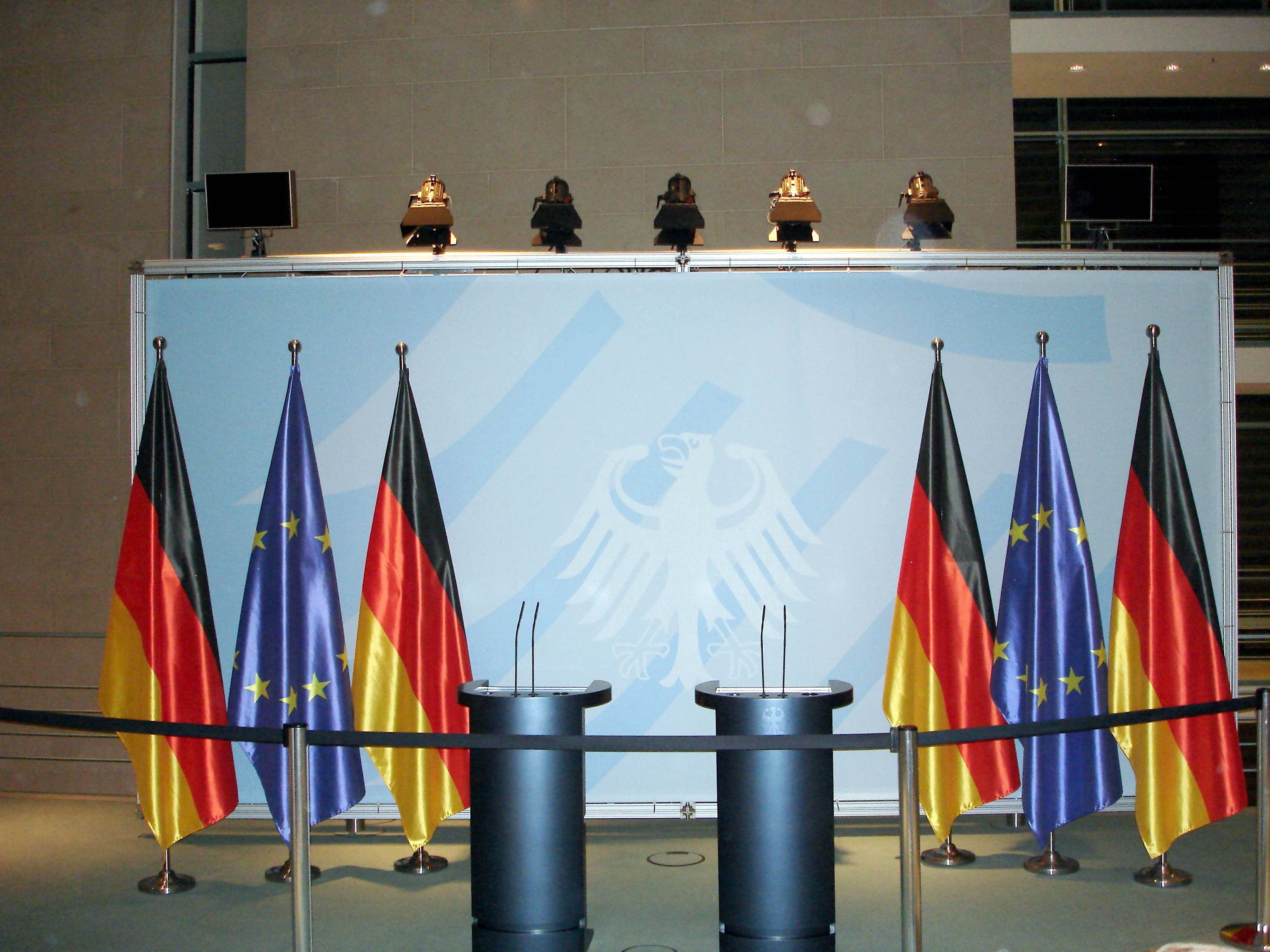 Pressewand im Bundeskanzleramt mit Rednerpulten. Das Rednerpult auf der rechten Bildseite ist mit dem Bundesadler der Bundesregierung verziert.